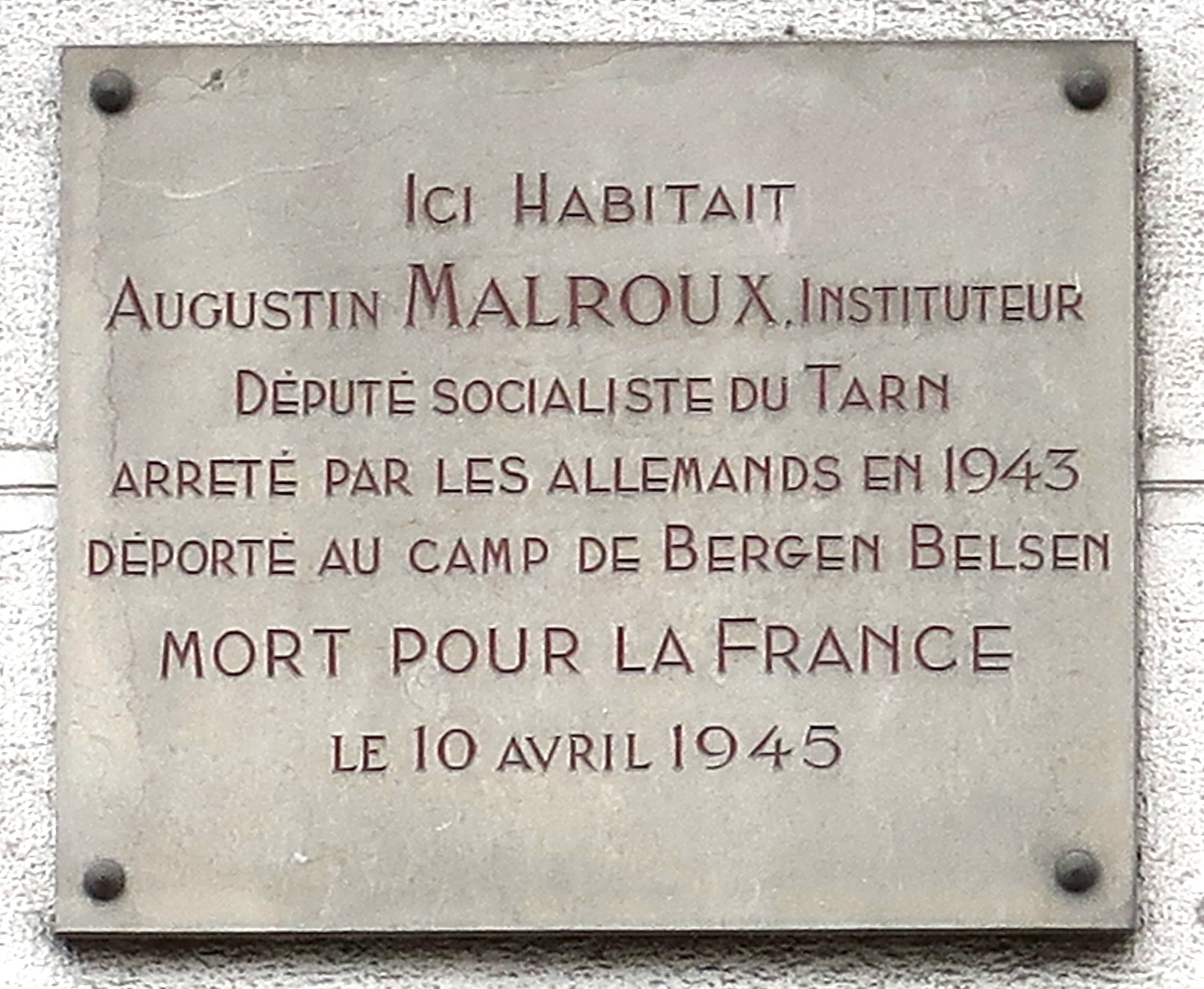 Plaque en hommage à Augustin Malroux, 2 rue Petel (Paris, 15e).